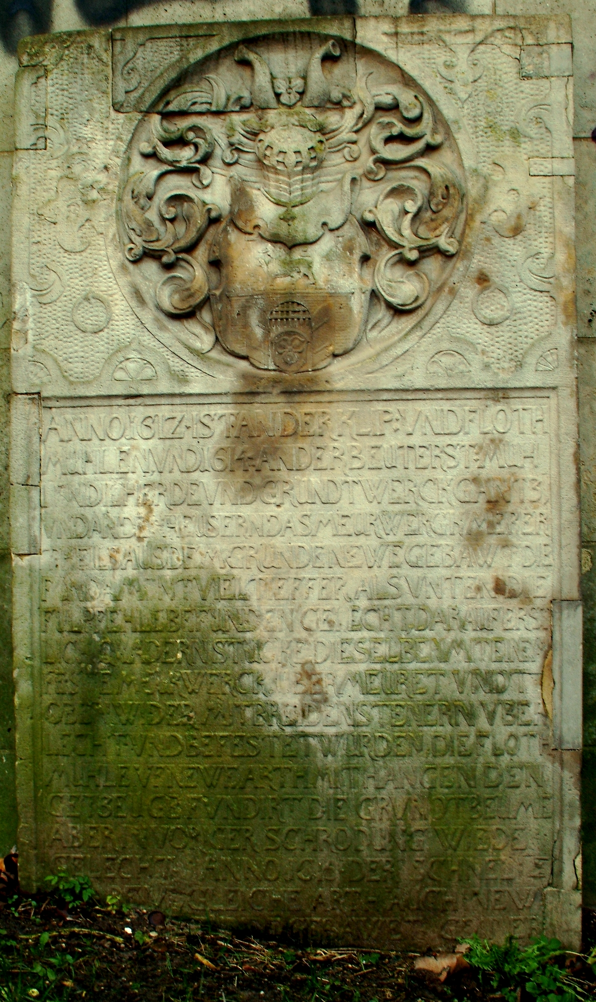 Inschriftenstein zur Klickmühle in Hannover, den Arnold Nöldeke auf das Jahr 1615 datiert und dem Bildhauer Hans Nottelmann urkundlich zuordnet. Die Inschrift lautet (Abschrift): „ANNO 1612 IST AN DER KLIP- UND FLOTH / MUHLEN UND 1614 AN DER BEUTERST MUH / LEN DIE HERDE- UND GRUNDWERCK GANTZ / UND AN DEN HEUSERN DAS MEURWERK MERER / THEILS AUS DEM GRUNDE NEWE GEBAWT, DIE / FUNDAMENT VIEL TIEFFER ALS UNTEN DIE / FULPFEHLE BEFUNDEN GELECHT, DARAUF ERST- / LICH QUADERNSTUCKE DIESELBEN MIT EINEM / FEST MEURWERCK UBERMEURET UNDT / OBEN WIDER MIT BREIDEN STENERN UBER- / LECHT UND BEFESTET WURDEN, DIE FLOTH / MUHLE UF NEWE ARTH MIT HANGENDEN / GETZEUGE FUNDIRT, DIE GRUNDT-BEUME / ABER IN VORIGER SCHRODUNG WIEDER / GELECHT. ANNO 1615 DER SCHNELLE / GRABE UF GLEICHE ARTH AUCH NEW / AUS DEM GRUNDE GEBAWET. GOT ER / HALTE DIE GEBEWDE LANGE.“ Der Inschriftenstein war später in das Bauwerk der Flusswasserkunst eingelassen und ist heute vor der Unterführung unter das Leibnizufer/Friedrichswall installiert (daneben befindet sich ein ähnlicher Inschriftenstein zur Baugeschichte der Brückmühle). Der Stein ist aus Deistersandstein geschlagen und hat die Maße 1,96 Meter mal 1,08 Meter. Er wurde an verschiedenen Stellen offensichtlich nach dem Zweiten Weltkrieg ausgebessert.